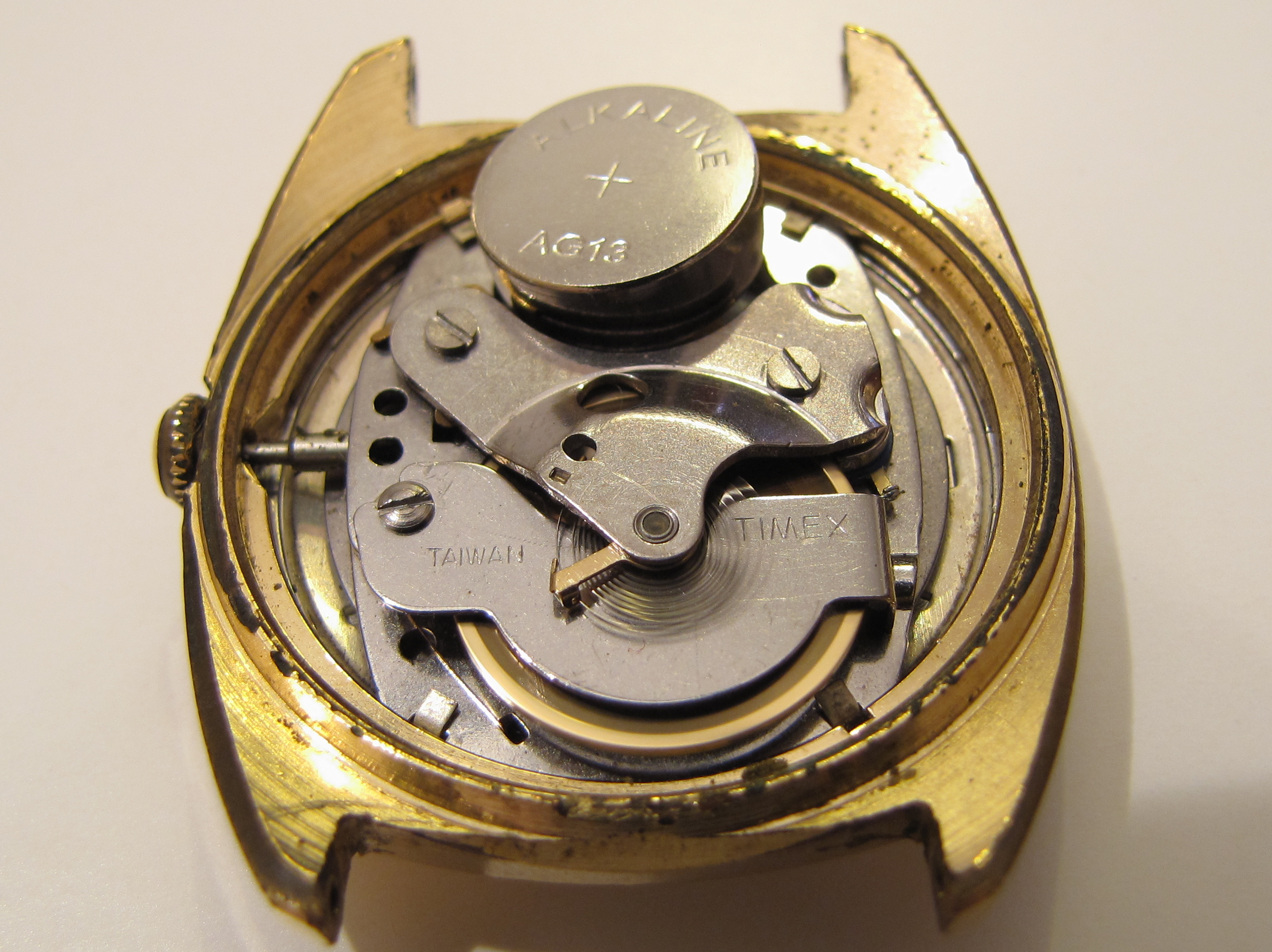 Mechanizm działania zegarka elektromechanicznego na przykładzie mechanizmu Timex M41